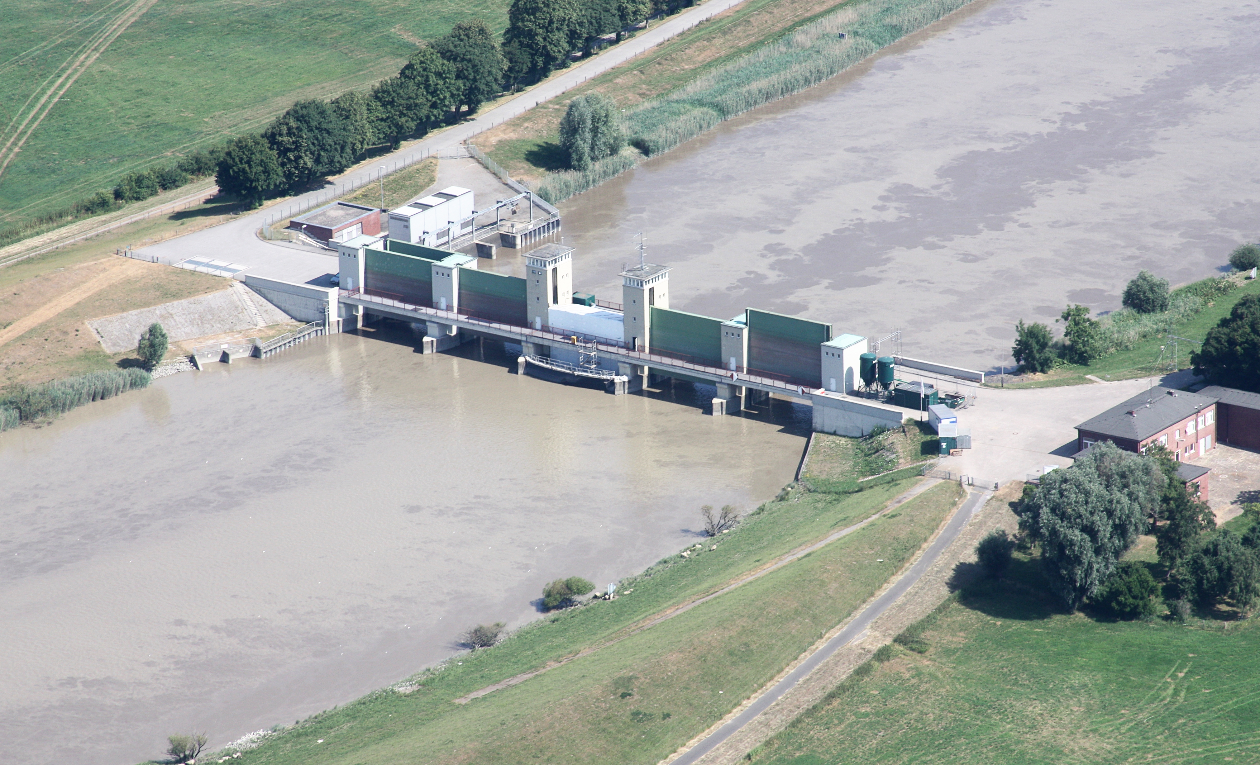 Luftaufnahme des Ledasperrwerks; Flug von Westerstede nach Leer; Flughöhe 1500 ft; Juli 2010; Originalfoto bearbeitet: Tonwertkorrektur und Bild geschärft mit Hochpassfilter